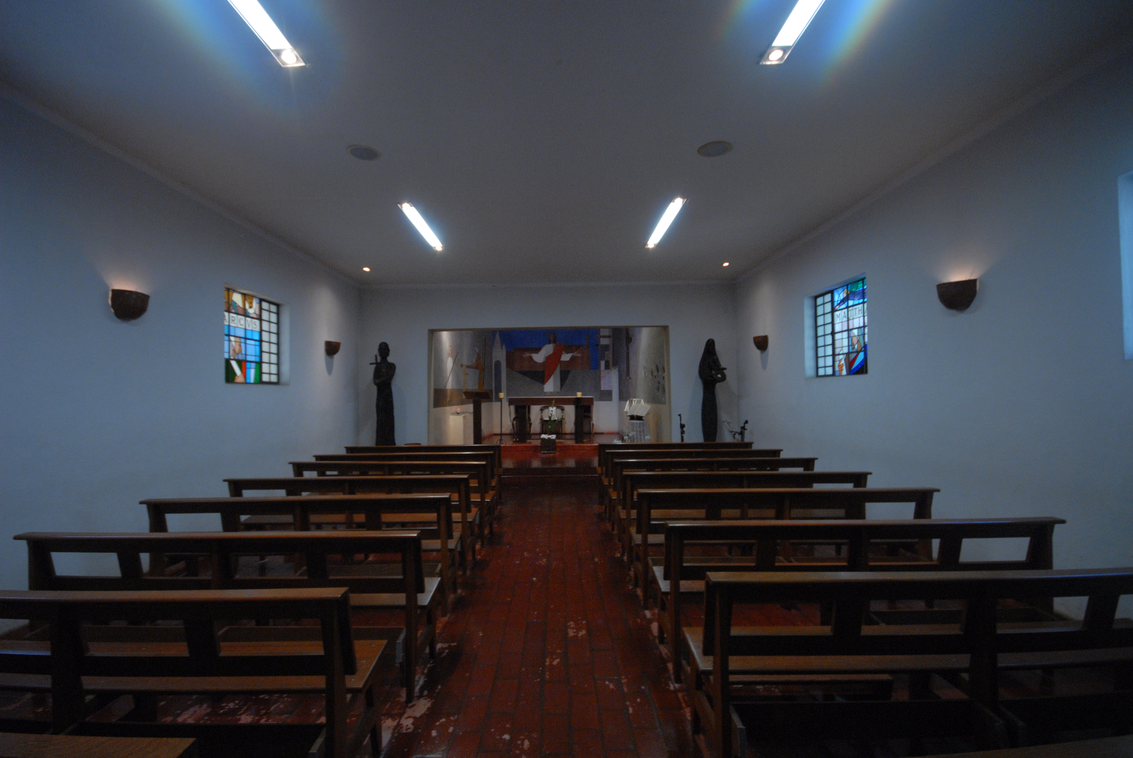 Capela do Cristo Operário a partir do altar